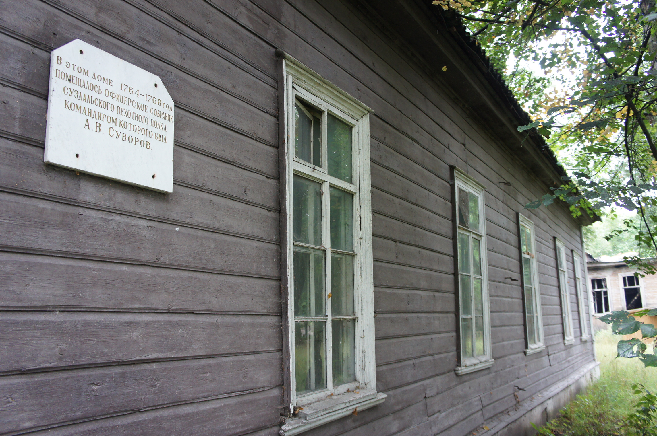 дом, в котором в 1764-1768 гг. находилось офицерское собрание Суздальского пехотного полка, командиром которого был А.В.Суворов